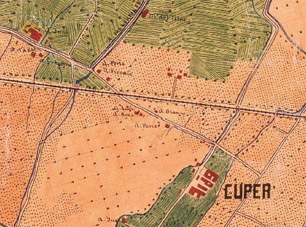 Roca-Cúiper el 1883 (el nord està a la dreta).